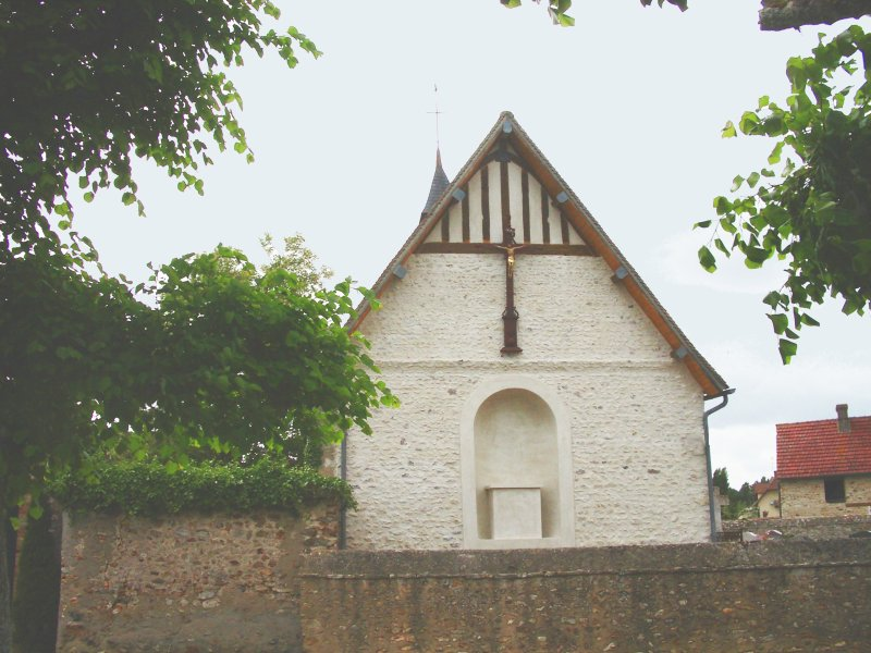 L'église de Rouvray (Eure)